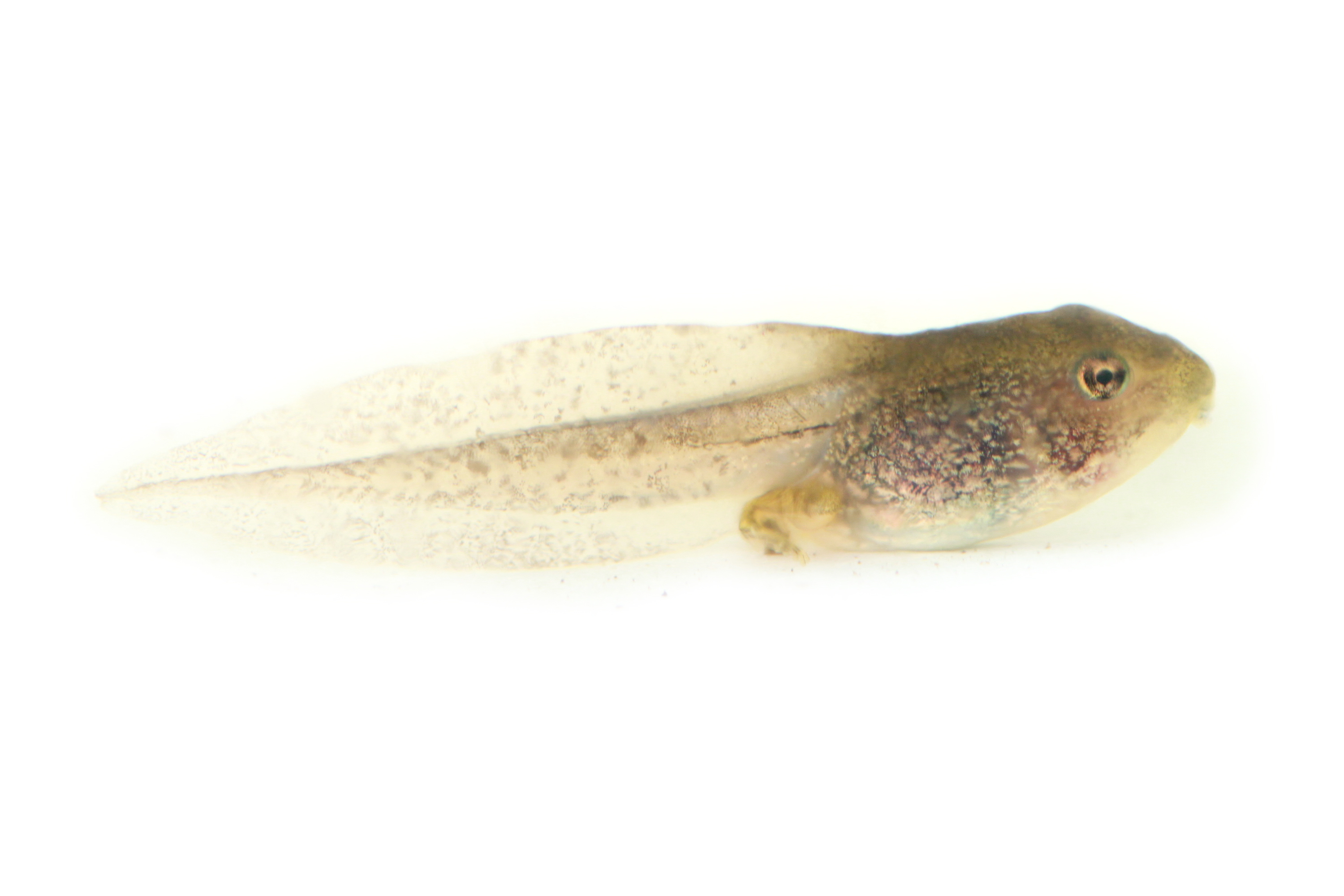 Woodfrog tadpole